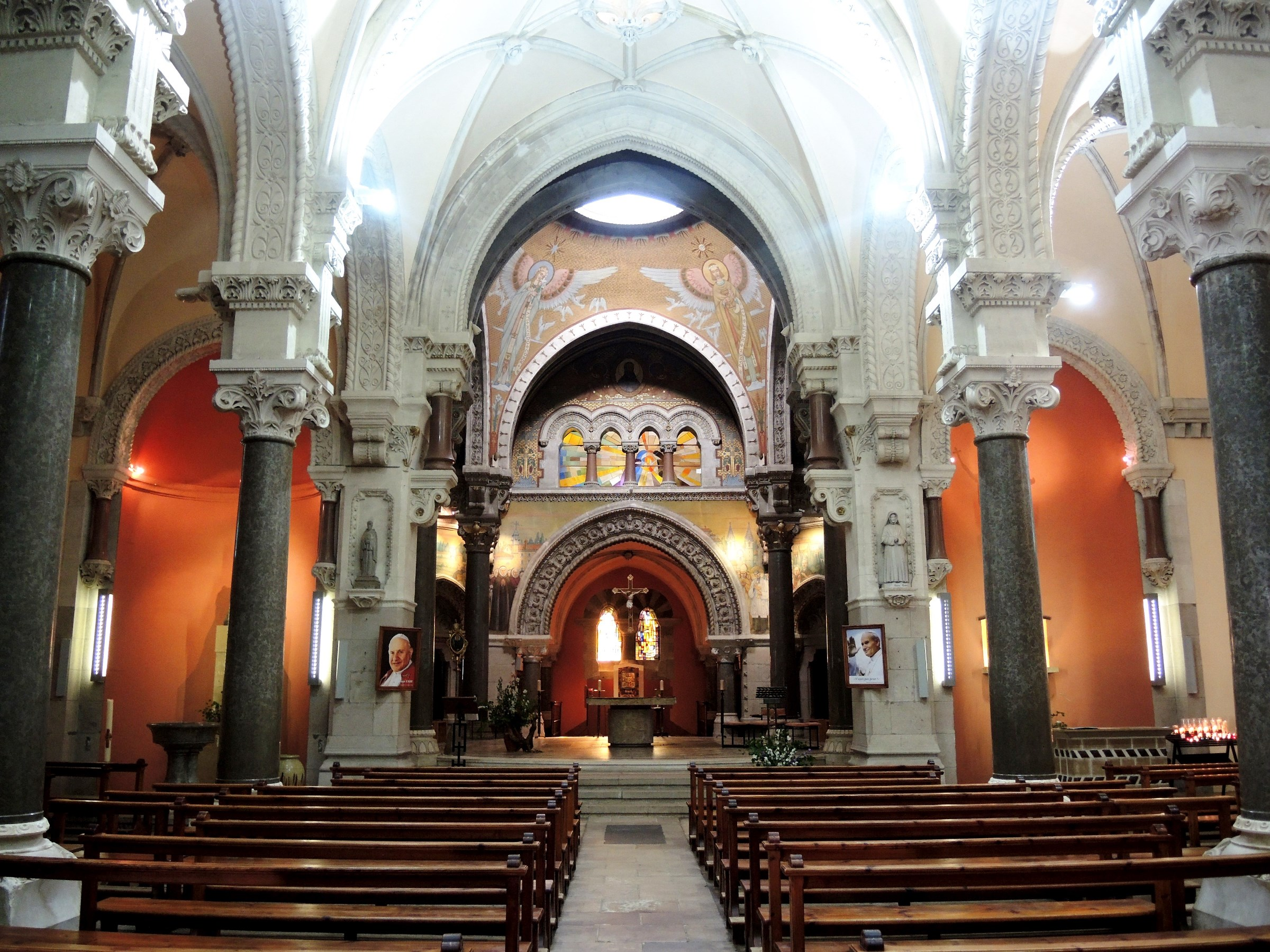 Lalouvesc basilique intérieur choeur